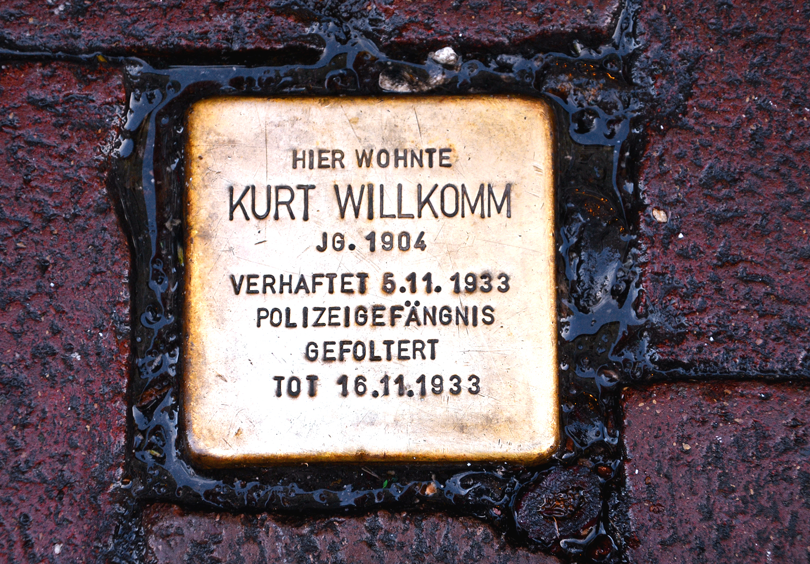 2008 verlegter und zu Weihnachten 2013 vorsichtig gesäuberter Stolperstein vor dem Gebäude Lister Meile 83 in Hannover (vor den Schaufenstern von "Schuh-Orlow") mit der Kurzinformation: „Hier wohnte für Kurt Willkomm, Jahrgang 1904, verhaftet 5.11.1933, Polizeigefängnis, gefoltert, tot 16.11.1933“ ...